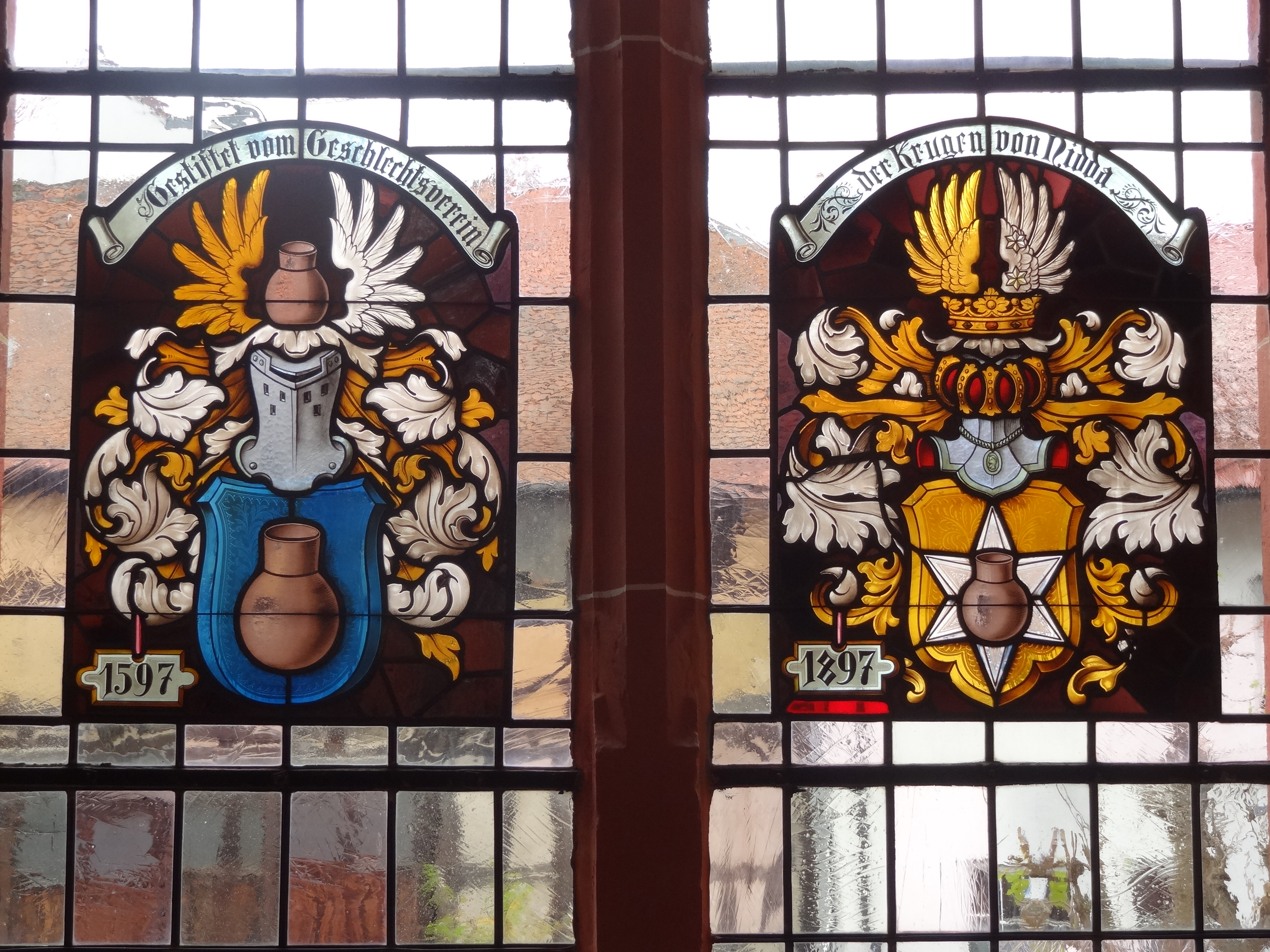 Stadtkirche zum Heiligen Geist (Nidda)